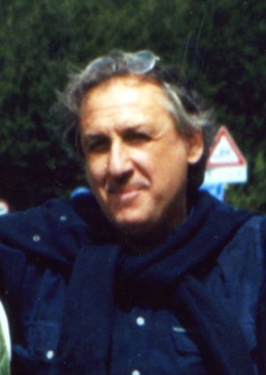 L'immagine di Michele Moramarco è stata concessa con licenza GFDL dall'autore come pubblicato sul sito